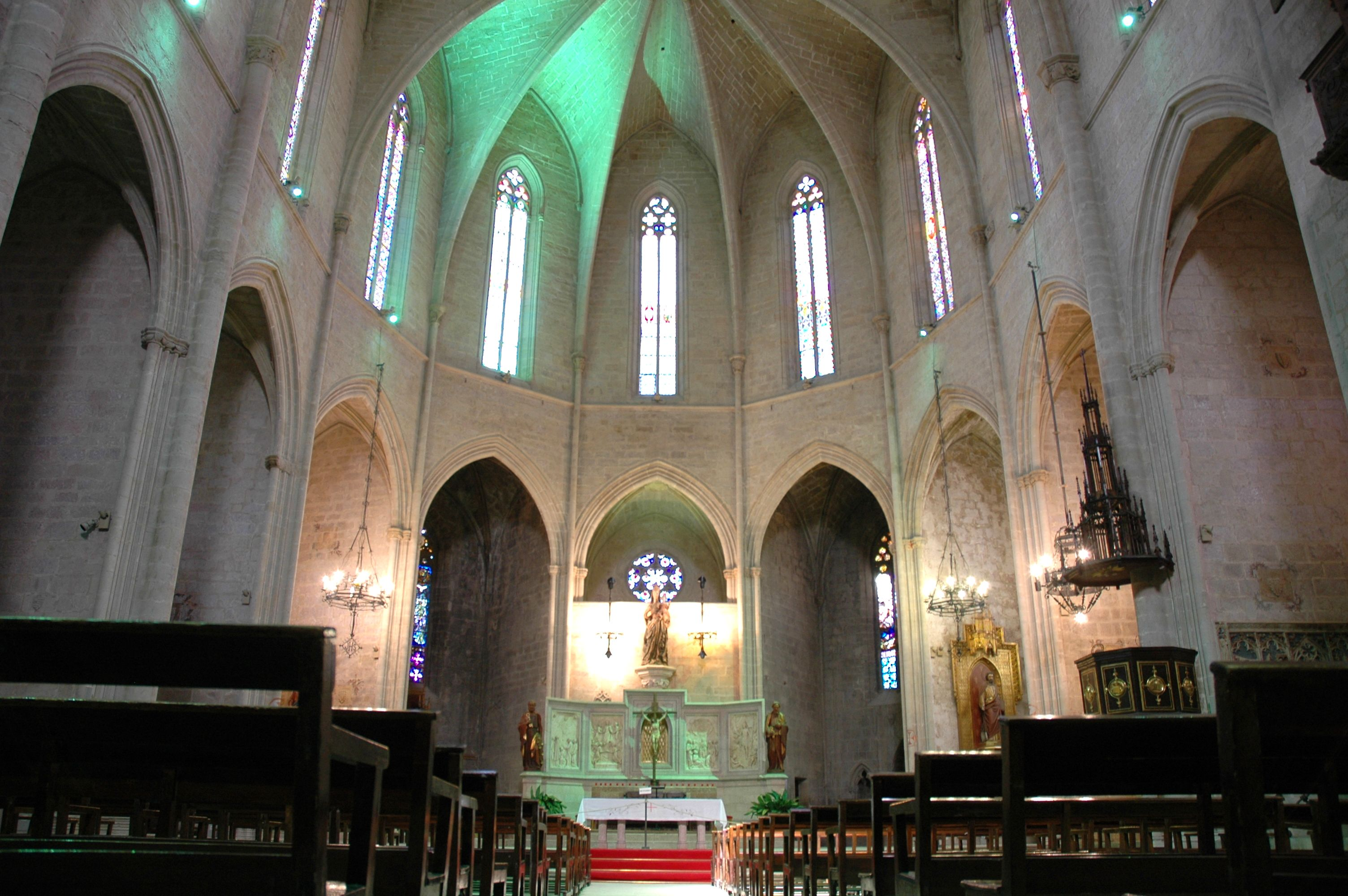 Santa Maria de Montblanc - Interior